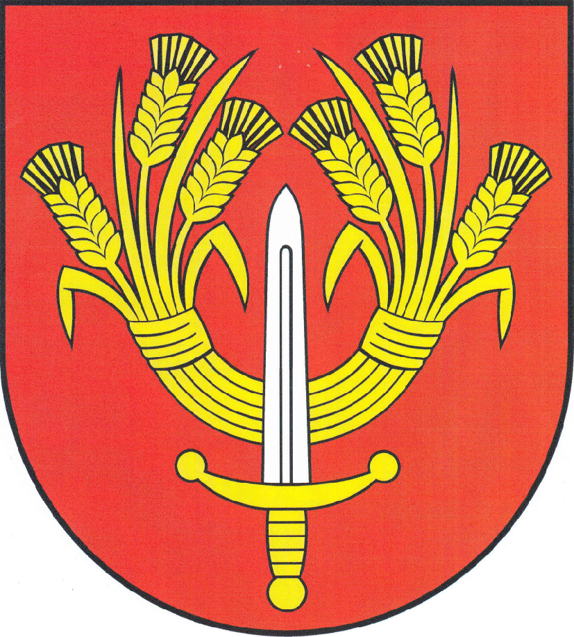 Herb gminy Osiek Mały.